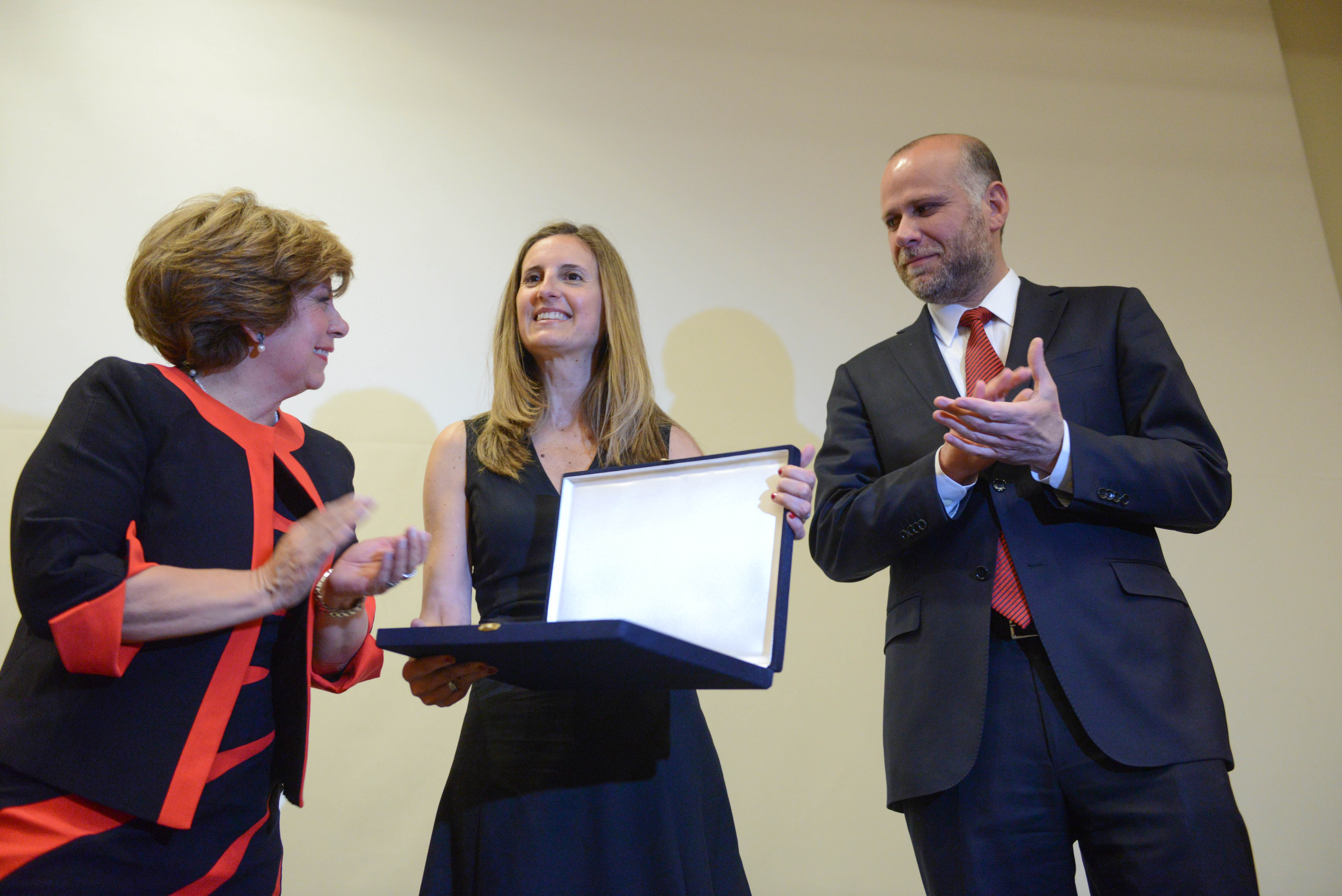 Ministro Elizalde entrega el premio Lenka Franulic a la periodista Paula Escobar